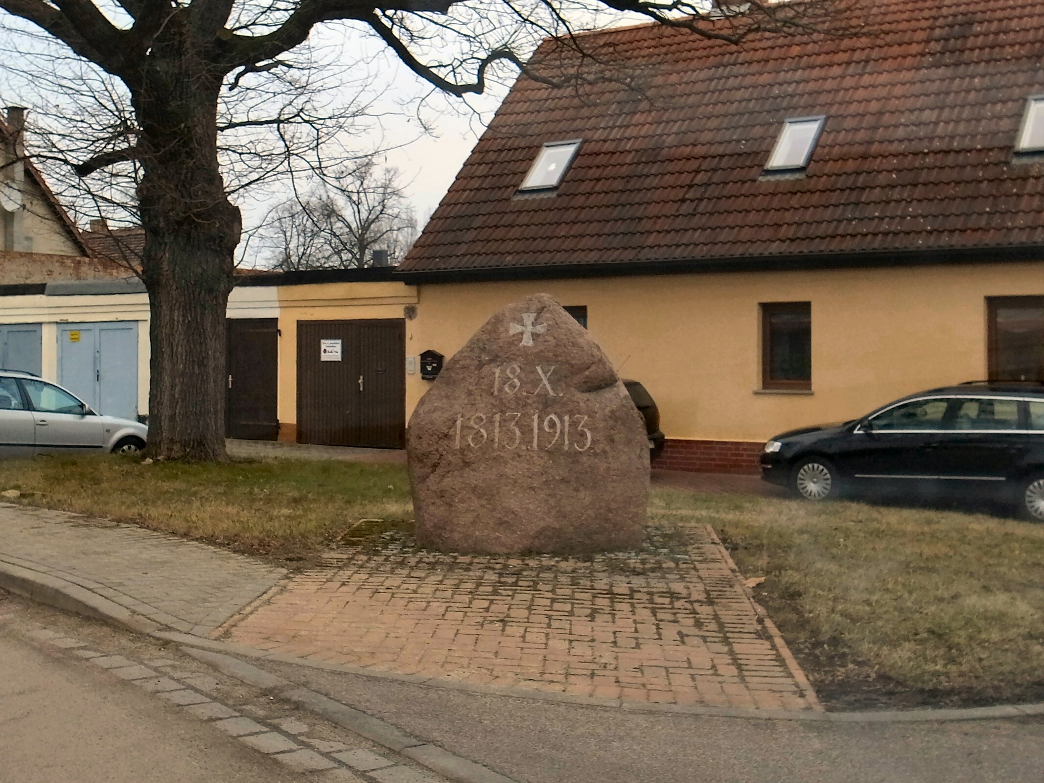 Weißandt-Gölzau, Gedenkstein 1813